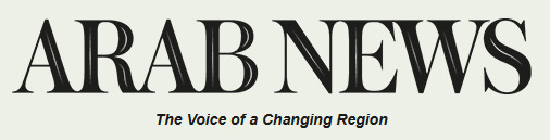 Logo von Arab News